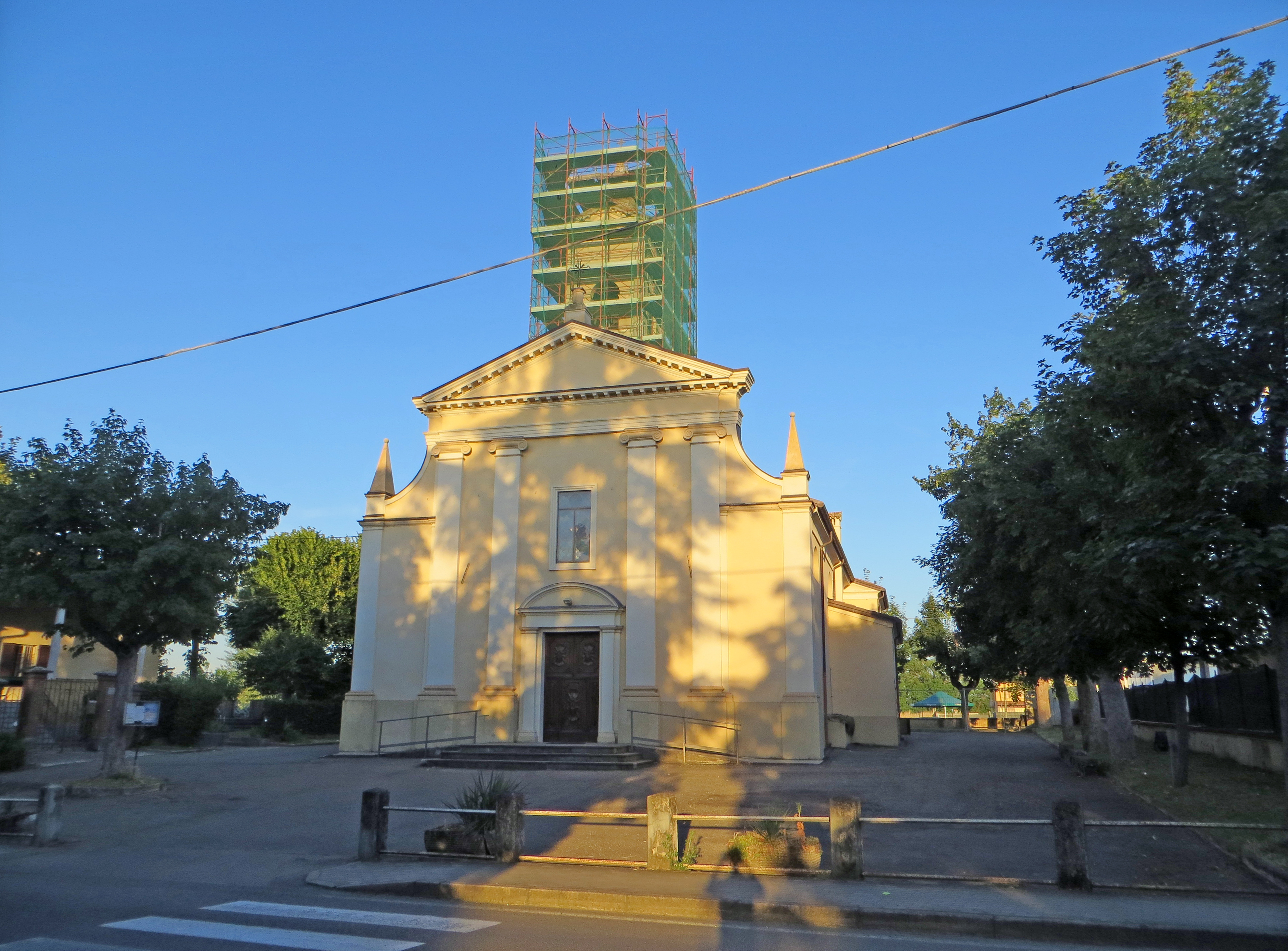 Chiesa di San Biagio (Mamiano) - facciata